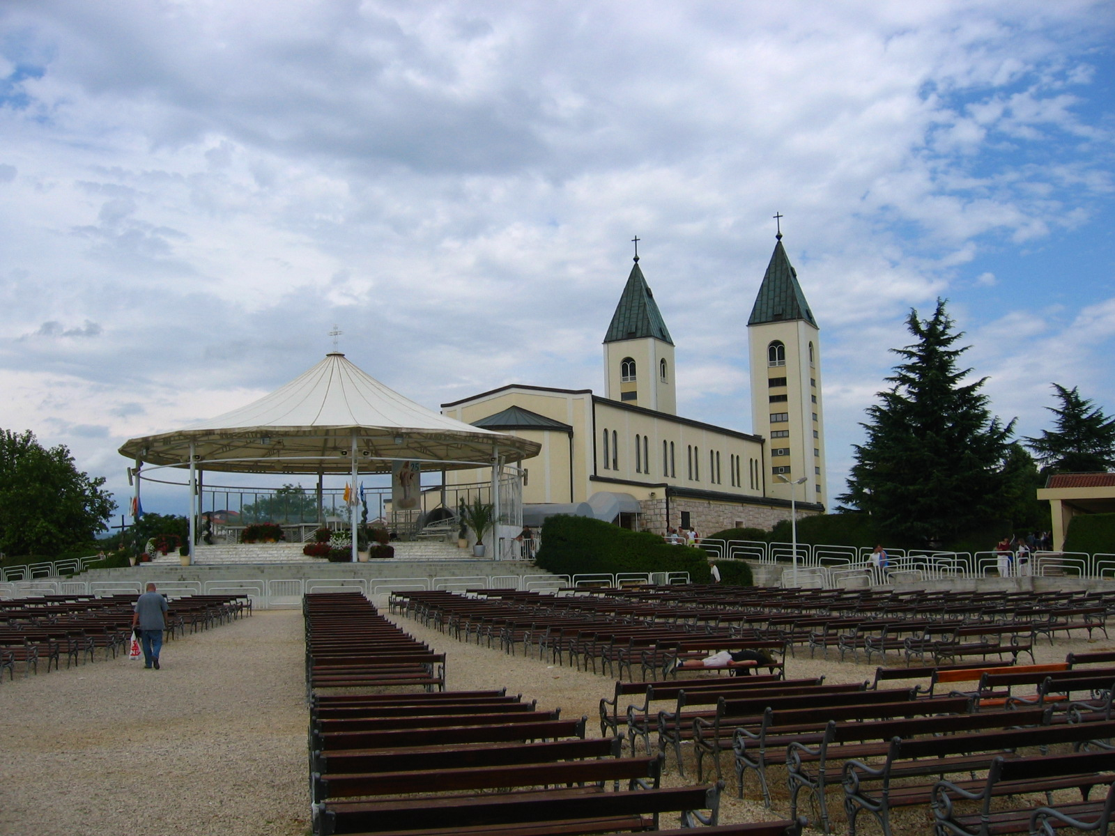 St. Jacob's Church, Međugorje, Herzegovina